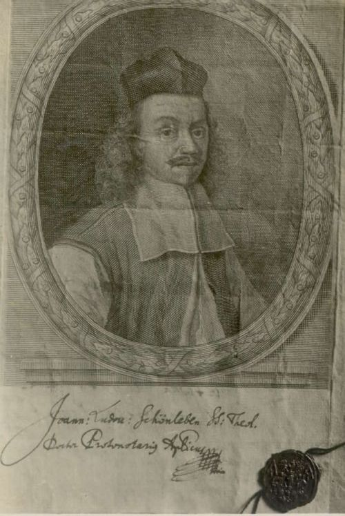 Janez Ludvik Schönleben (1618-1681), Slovene writer, historian and priest.